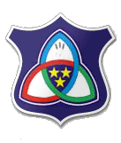 Wappen der Stadt und Gemeinde Mali Iđoš